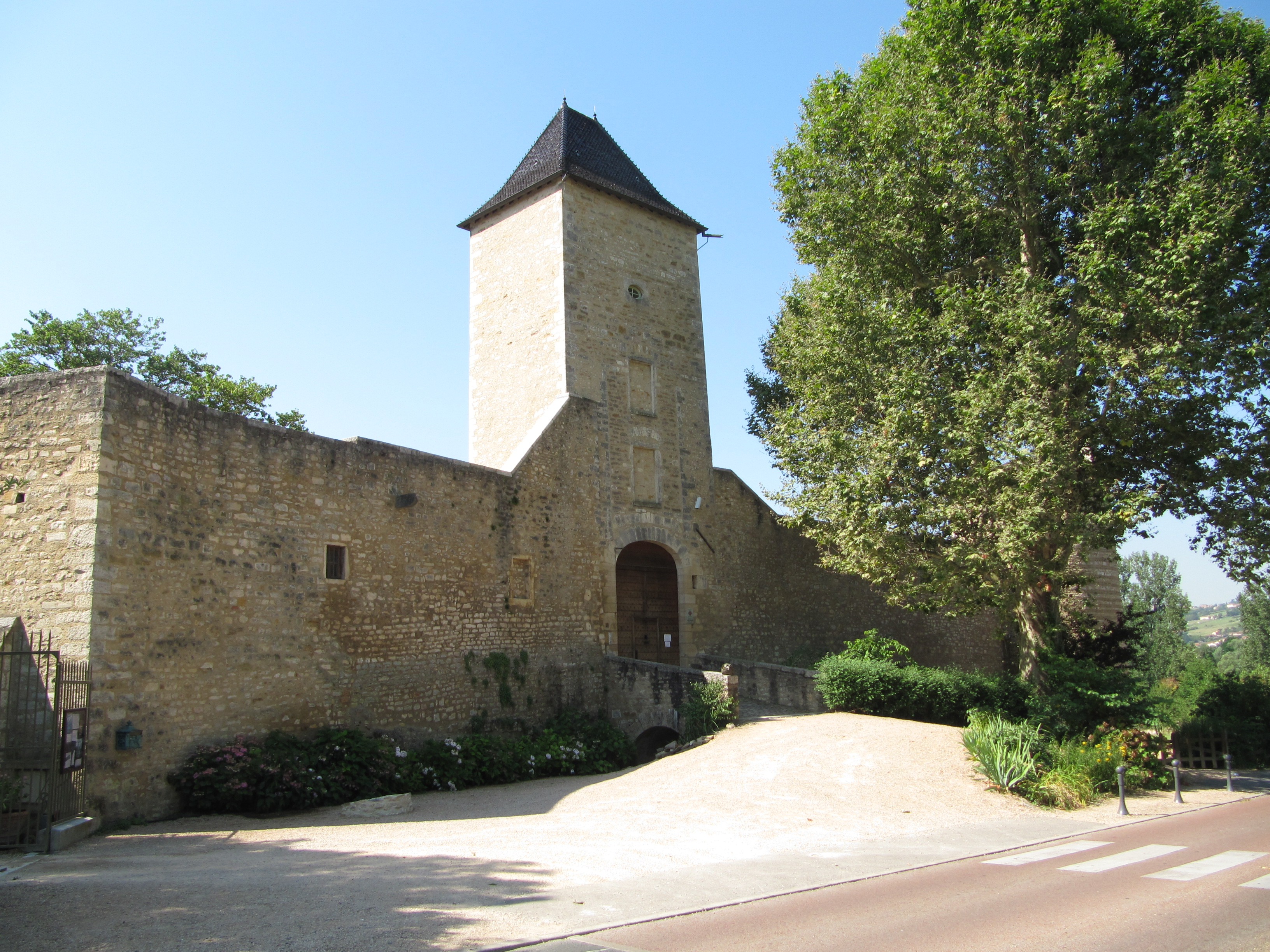 Château de Saint-Bernard